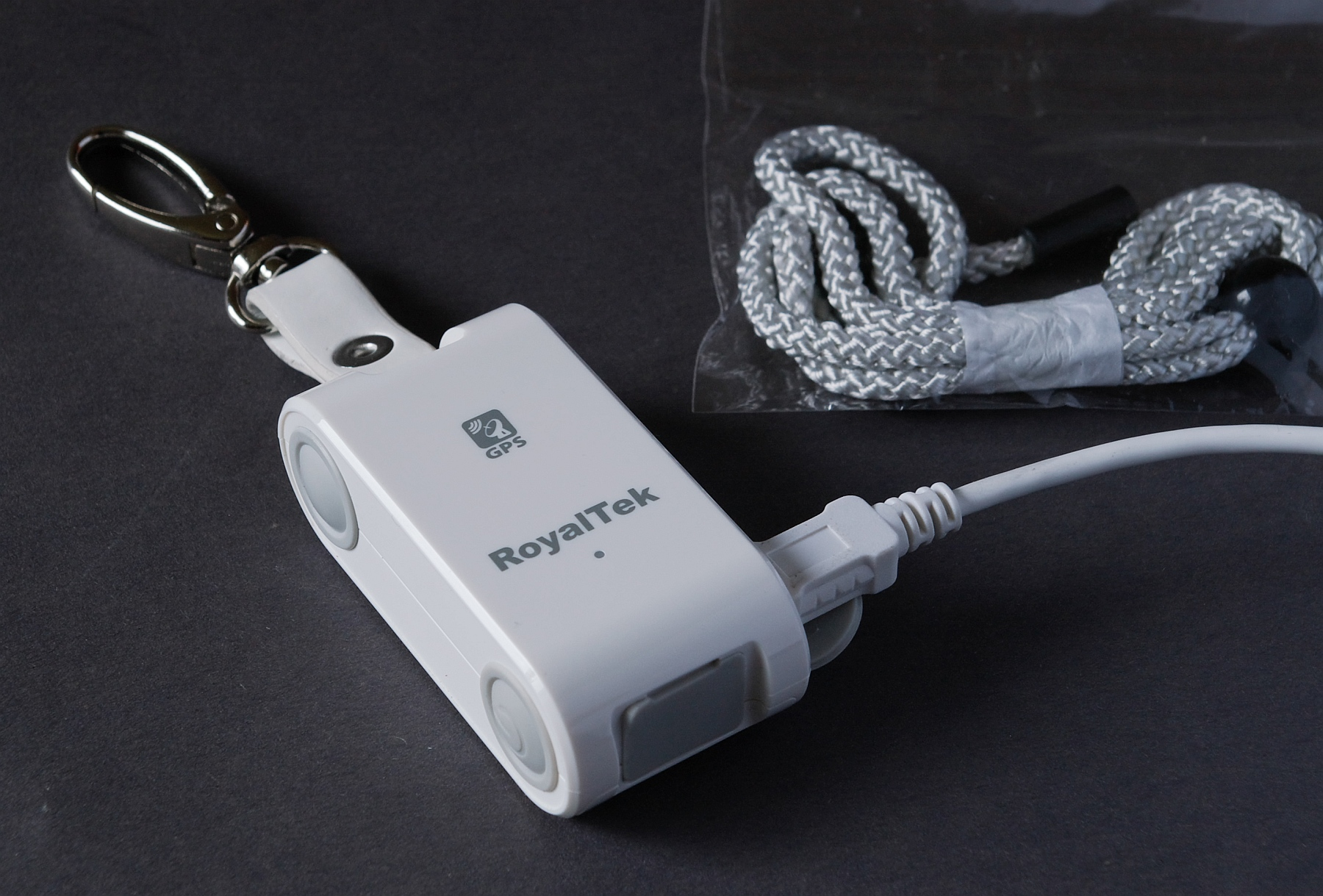 Royaltek RGM-3800 GPS-Logger mit angeschlossenem USB-Kabel zur Datenübertragung, Befestigungsclip und mitgelieferter Kordel